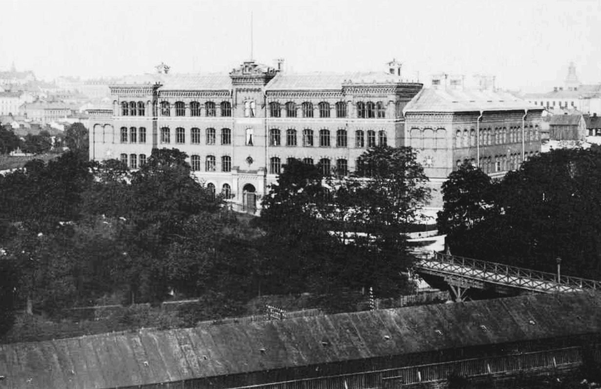 Maria folkskola vid Ringvägen 23. Nuvarande Mariaskolan